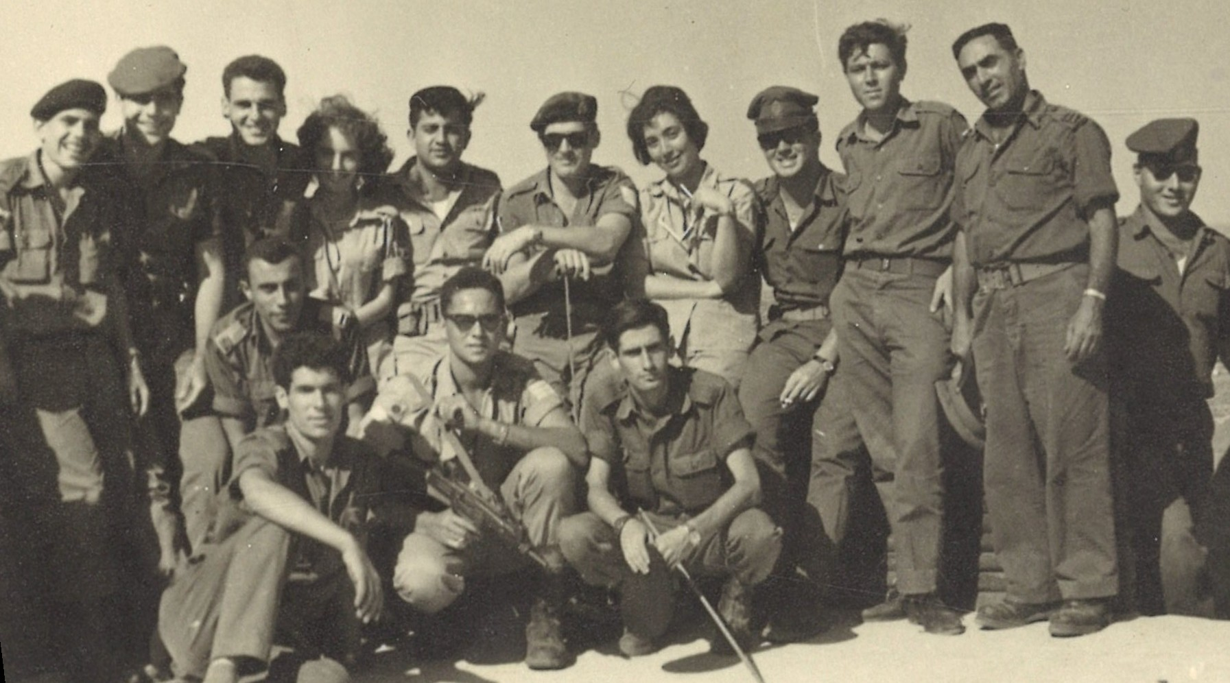 עמי חובב (עומד, חמישי משמאל) וחייליו